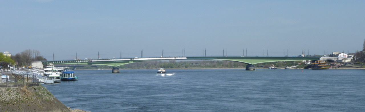 Bonn - Kennedybrücke - während des Einbaus einer Solaranlage